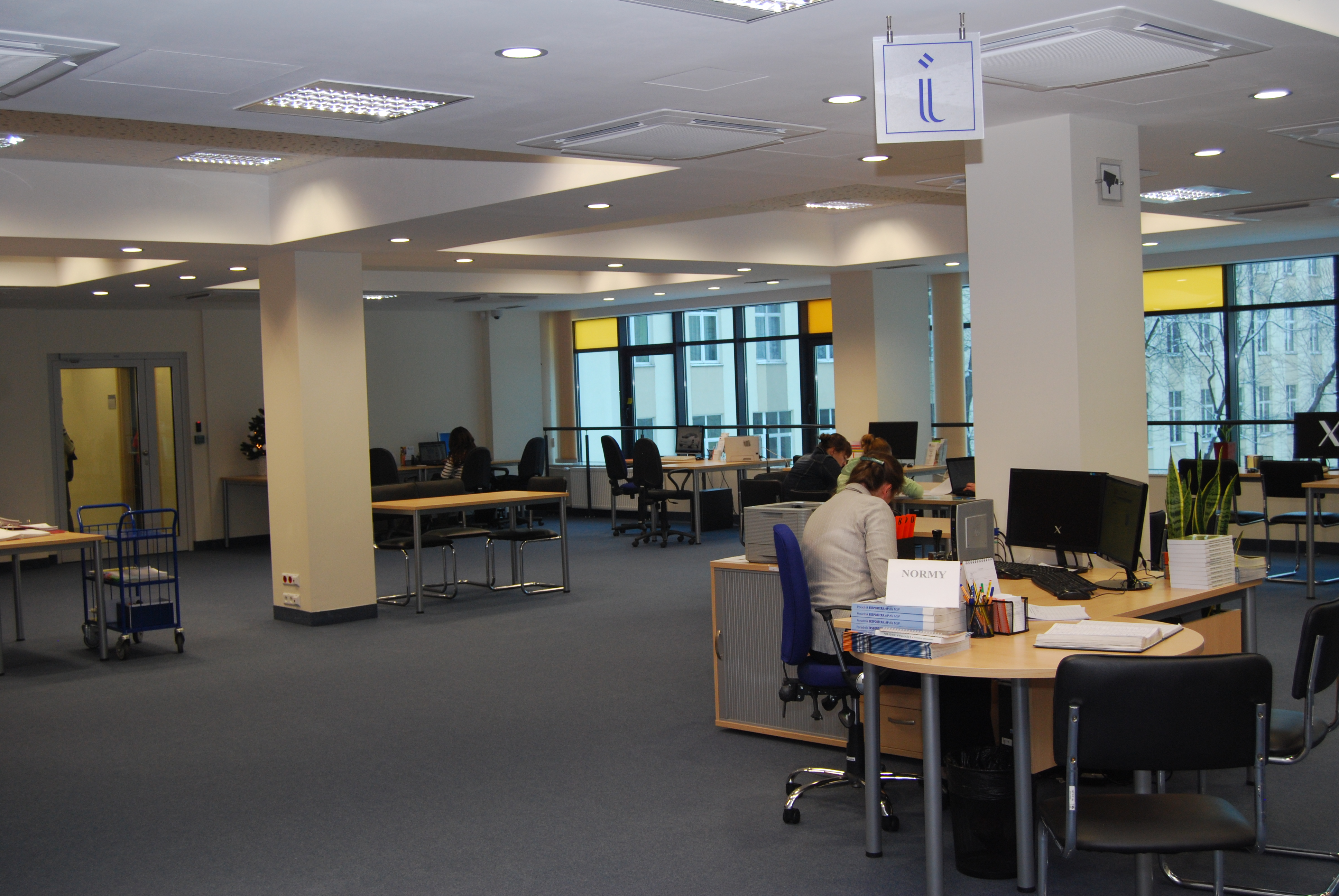 Czytelnia Zbiorów Specjalnych BG AGH w Krakowie